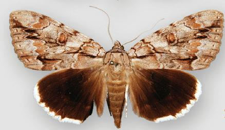 Catocala luctuosa